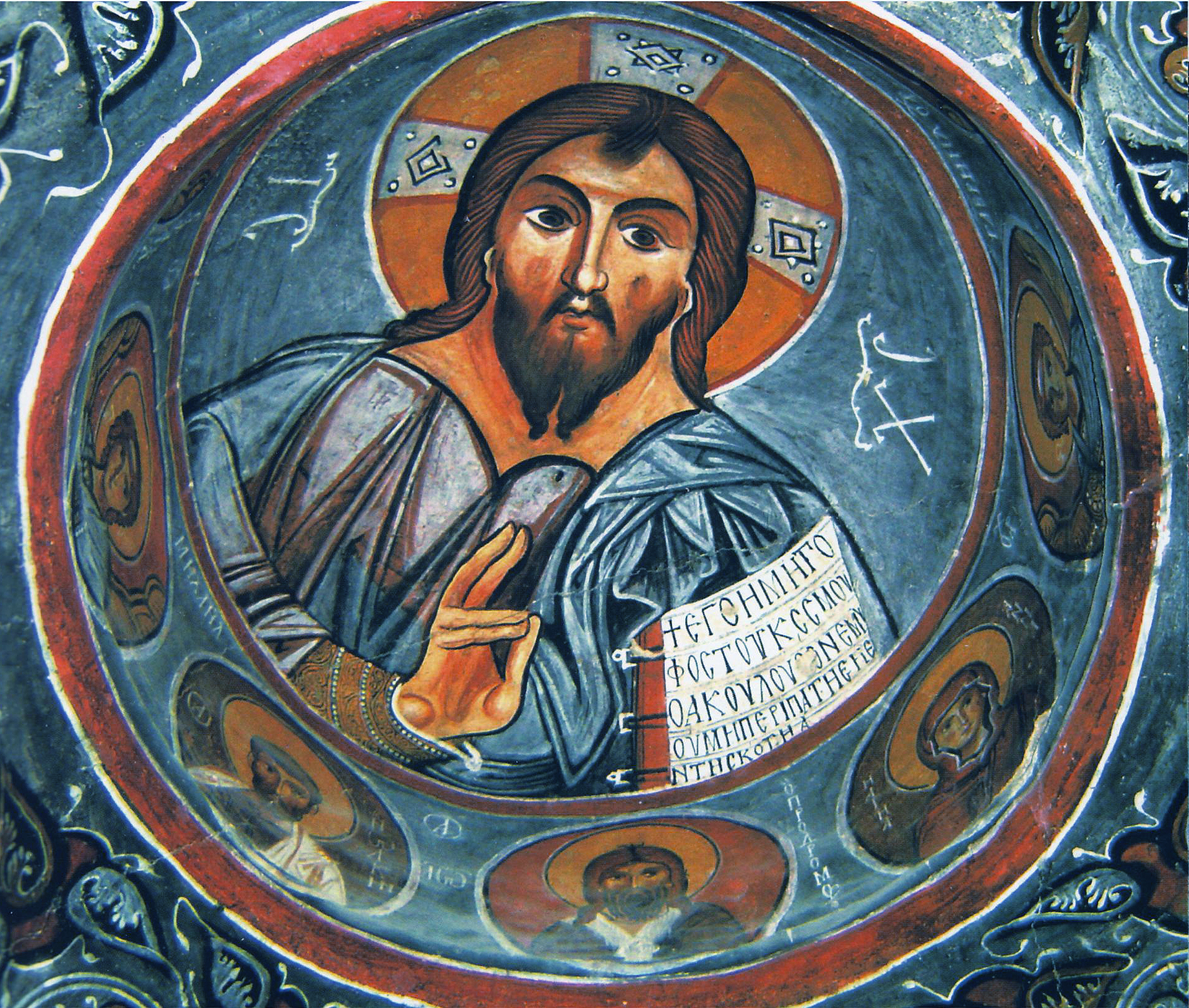 Kappadókia/Göreme Nemzeti Park: Karanlik-templom (Karanlik Kilise) freskója